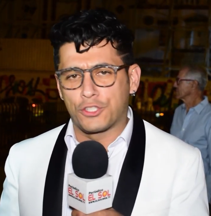 Santiago Alarcón en Premios India Catalina en 2019